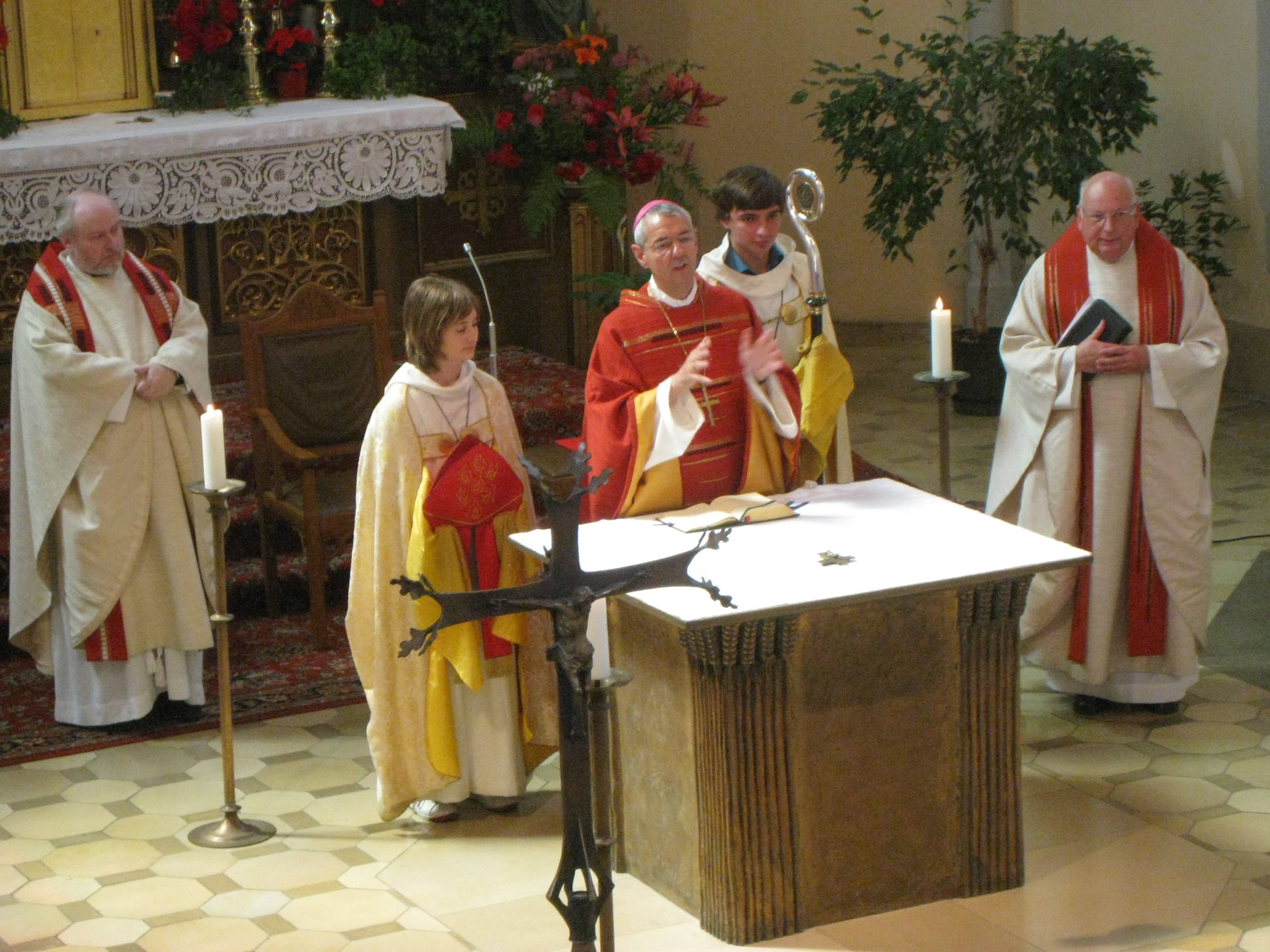 Erzbischof Prof. Dr. Ludwig Schick in Hof